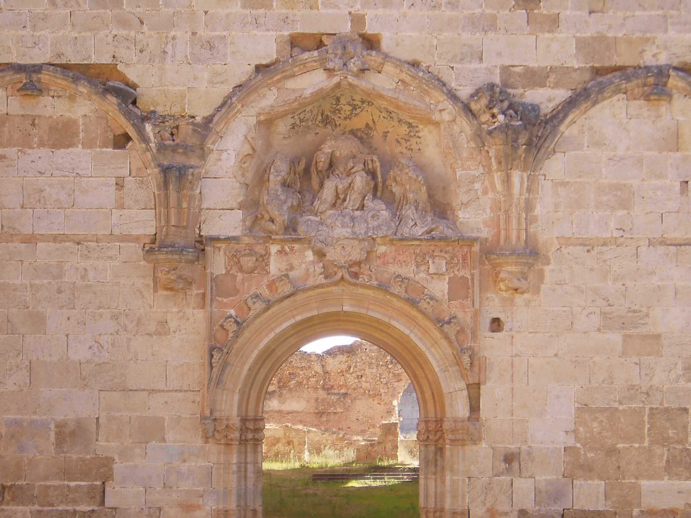 Detalle de la fachada de la Cartuja de Vall de Crist